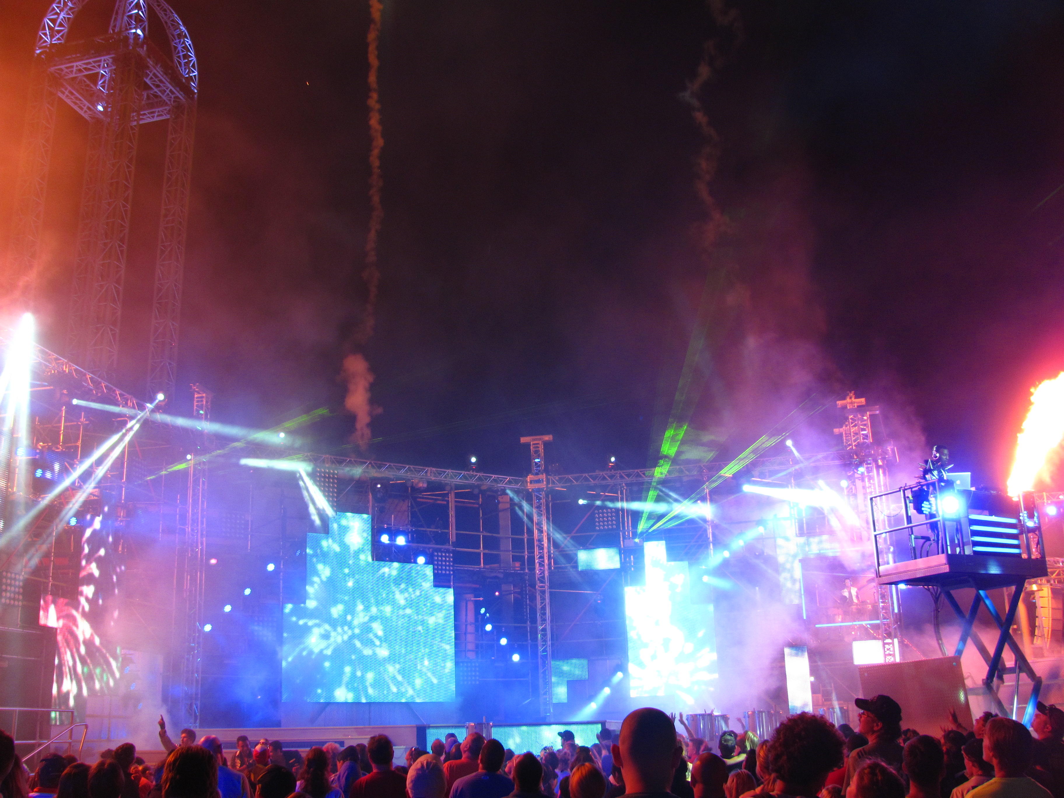 Cedar Point 101